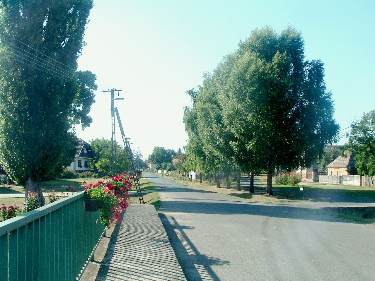 Lócs